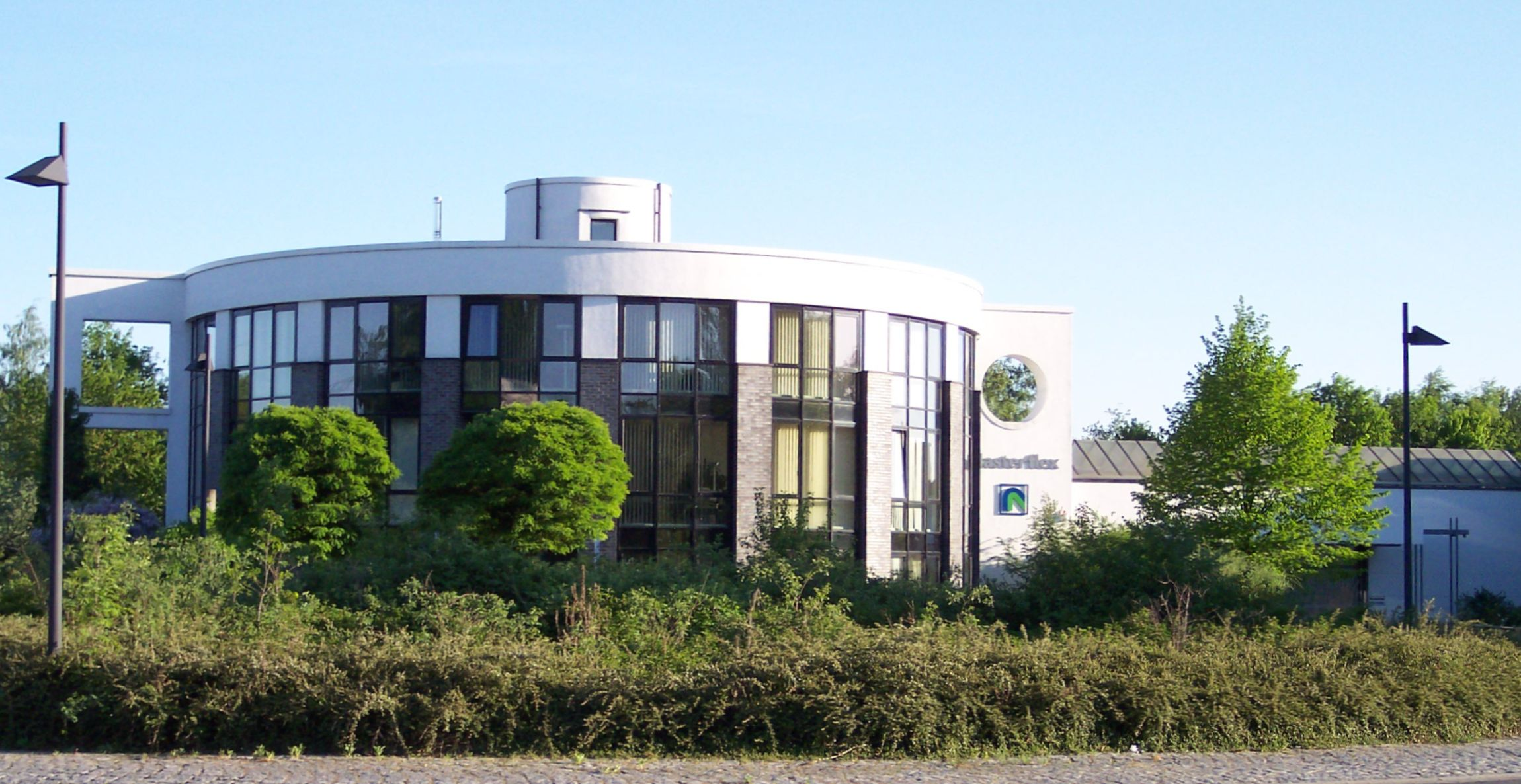 Masterflex